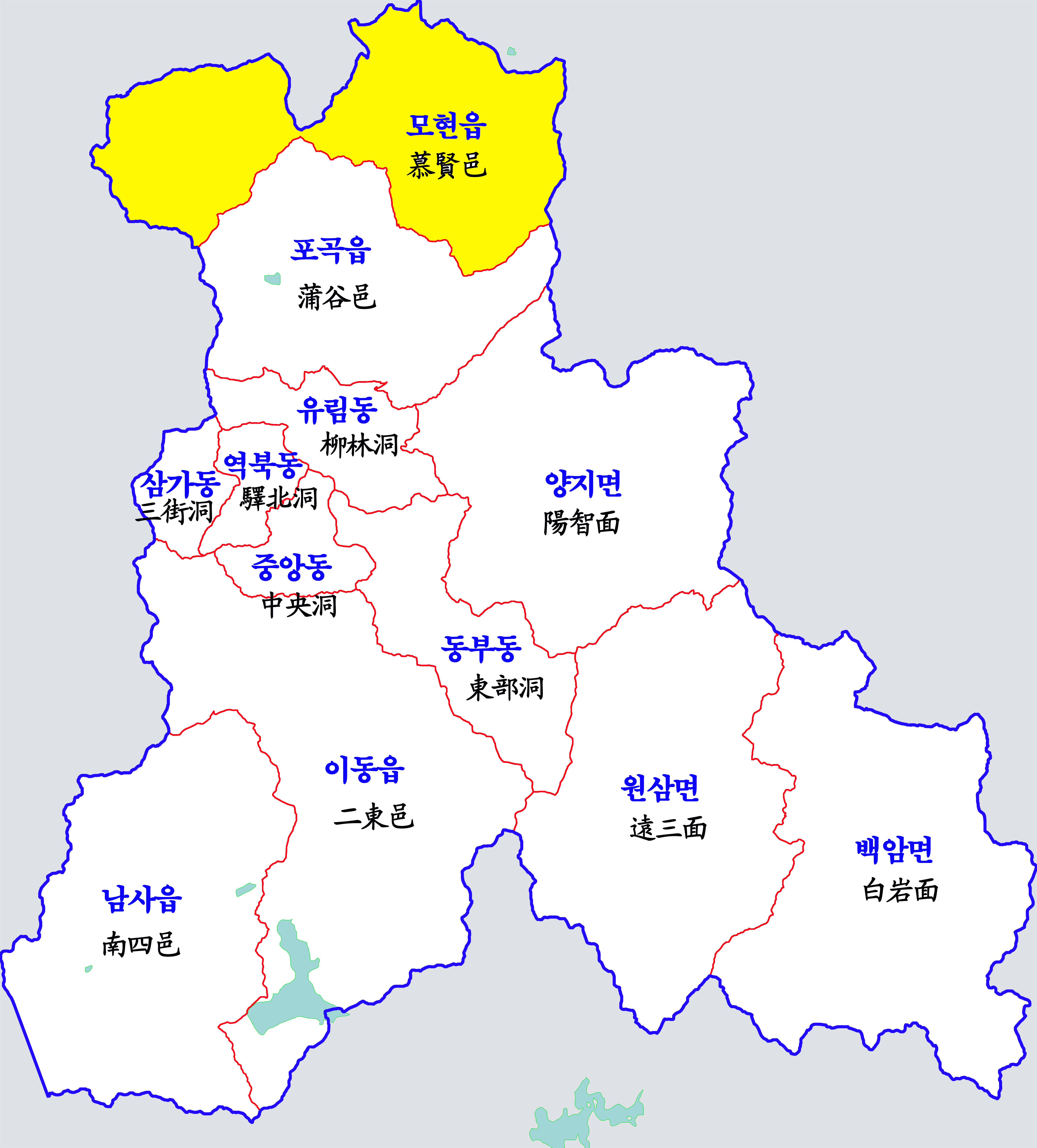 모현읍과 이동읍의 승격을 반영한 최신 처인구 지도 / SVG 버전: File:New-Cheoingu-map.svg